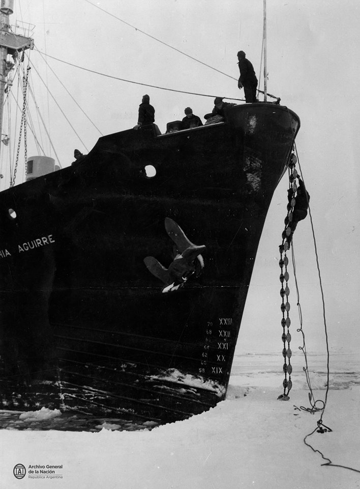 ARA "Bahía Aguirre" detenido por el mar helado en la Bahía Margarita. Antártida Argentina, 1959. AGN_DDF/ Caja 334, inv: 225469.